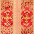 Орнамент із ряси православного священика